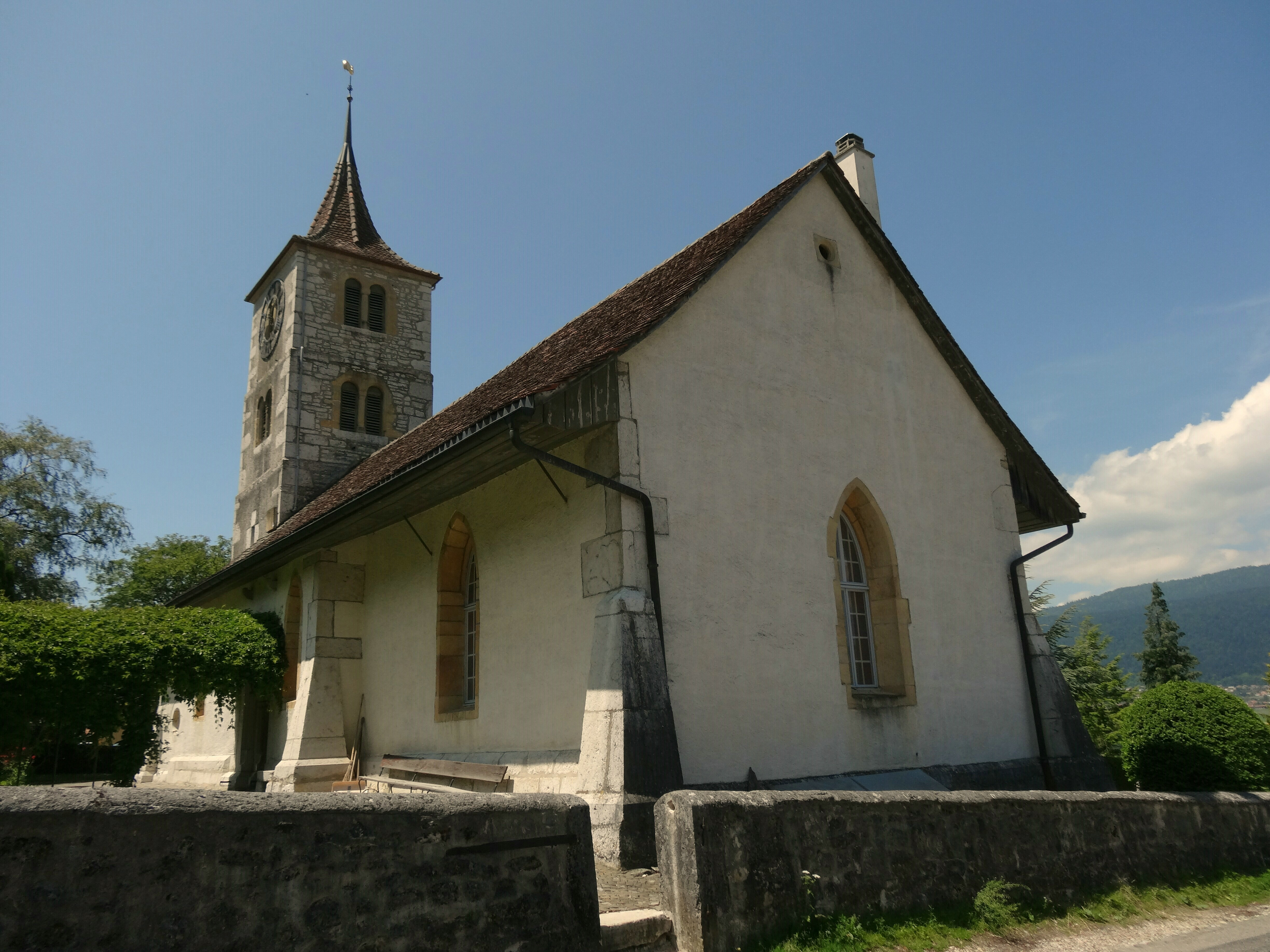 Savagnier, Le temple